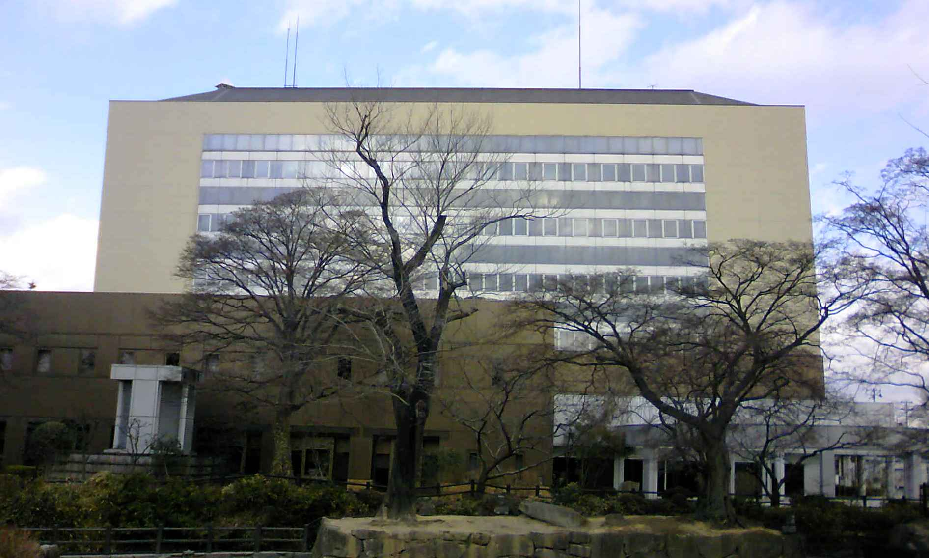 仙台市若林区役所 Wakabayashi Kuyaku-sho, Word Office of Wakabayashi-ku Sendai, Japan